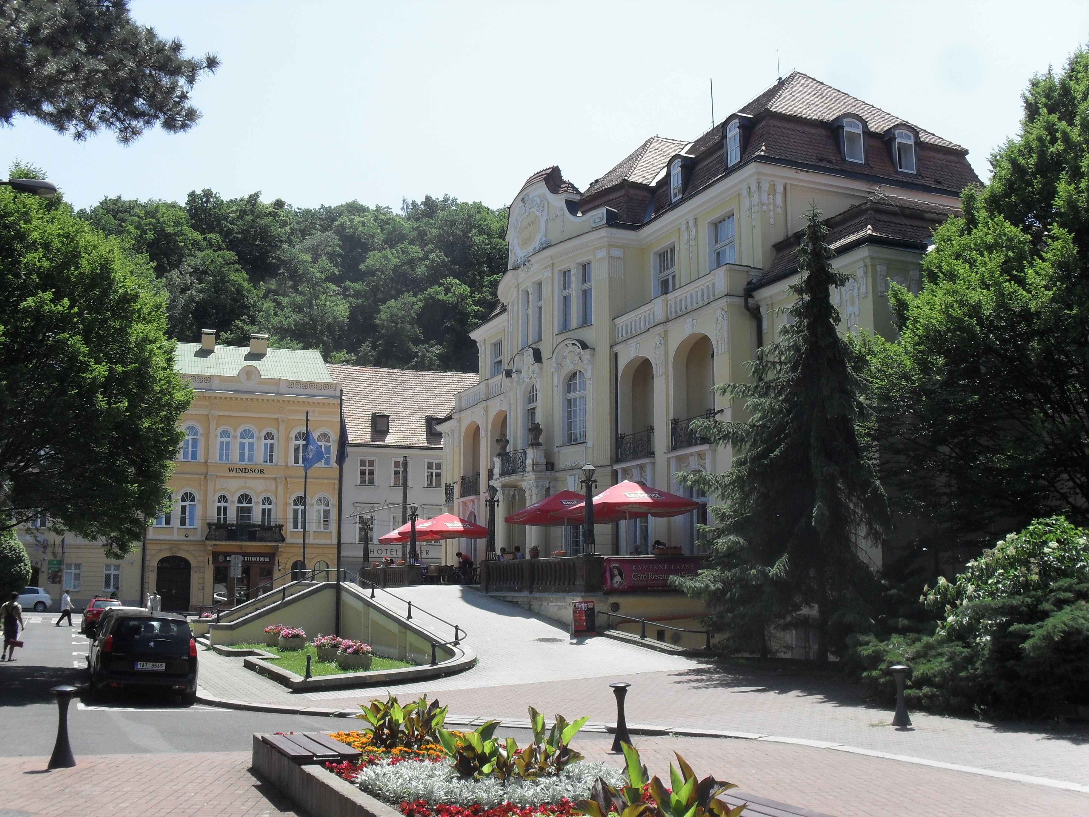 Městské lázně Kamenné (Teplice)- U Hadích lázní 1470, Teplice